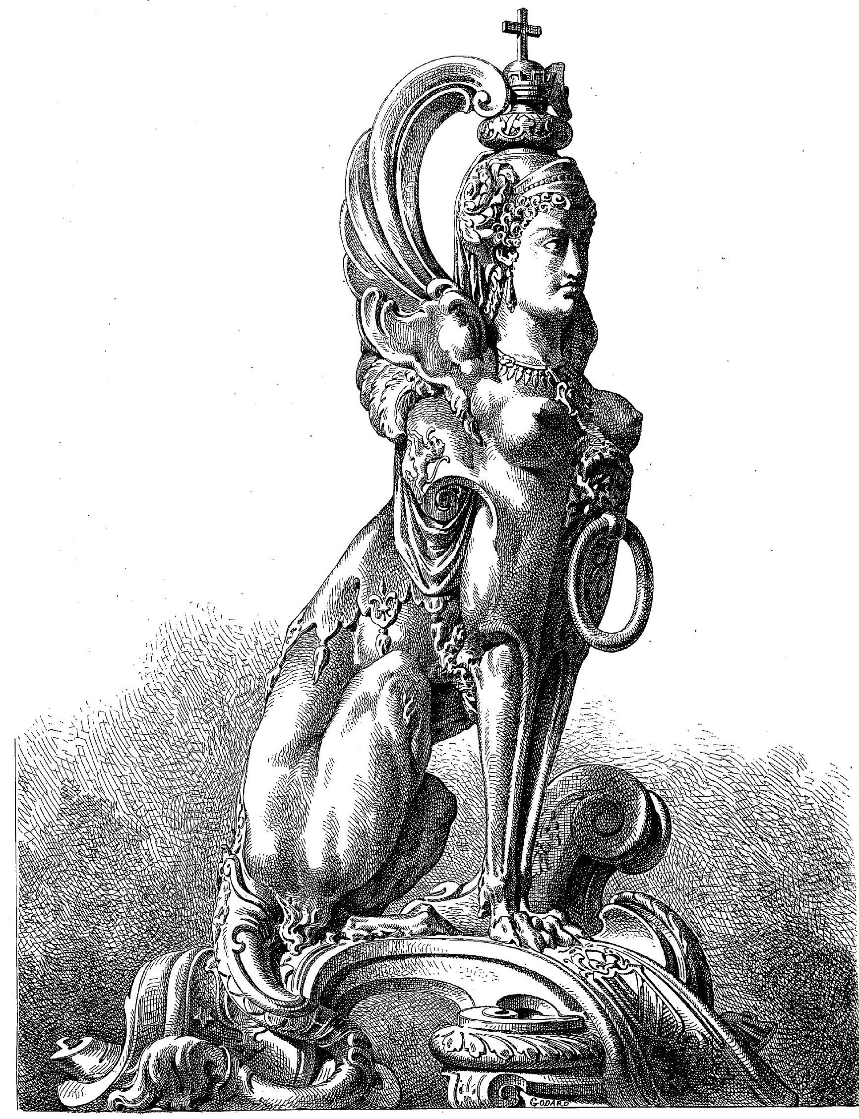 Illustration d'un chenet exécuté par la maison Paillard dont le modèle, réalisé par Eugène Piat, est identique à la paire de sphinges en marbre blanc présentées par l'artiste au Salon de 1874.